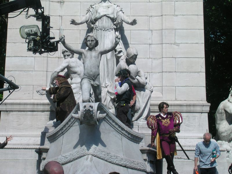 Scène de tournage du film Enchanted (Disney)